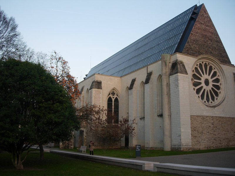 Galerie David d'Angers, située dans l'abbaye Toussaint à Angers (Maine-et-Loire, France).